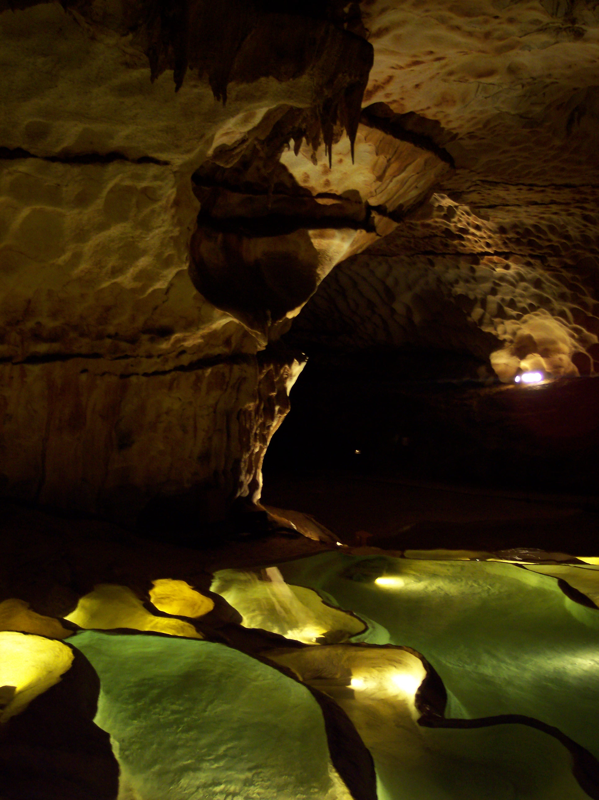 Gours d'une des grottes de Saint Marcel d'Ardèche